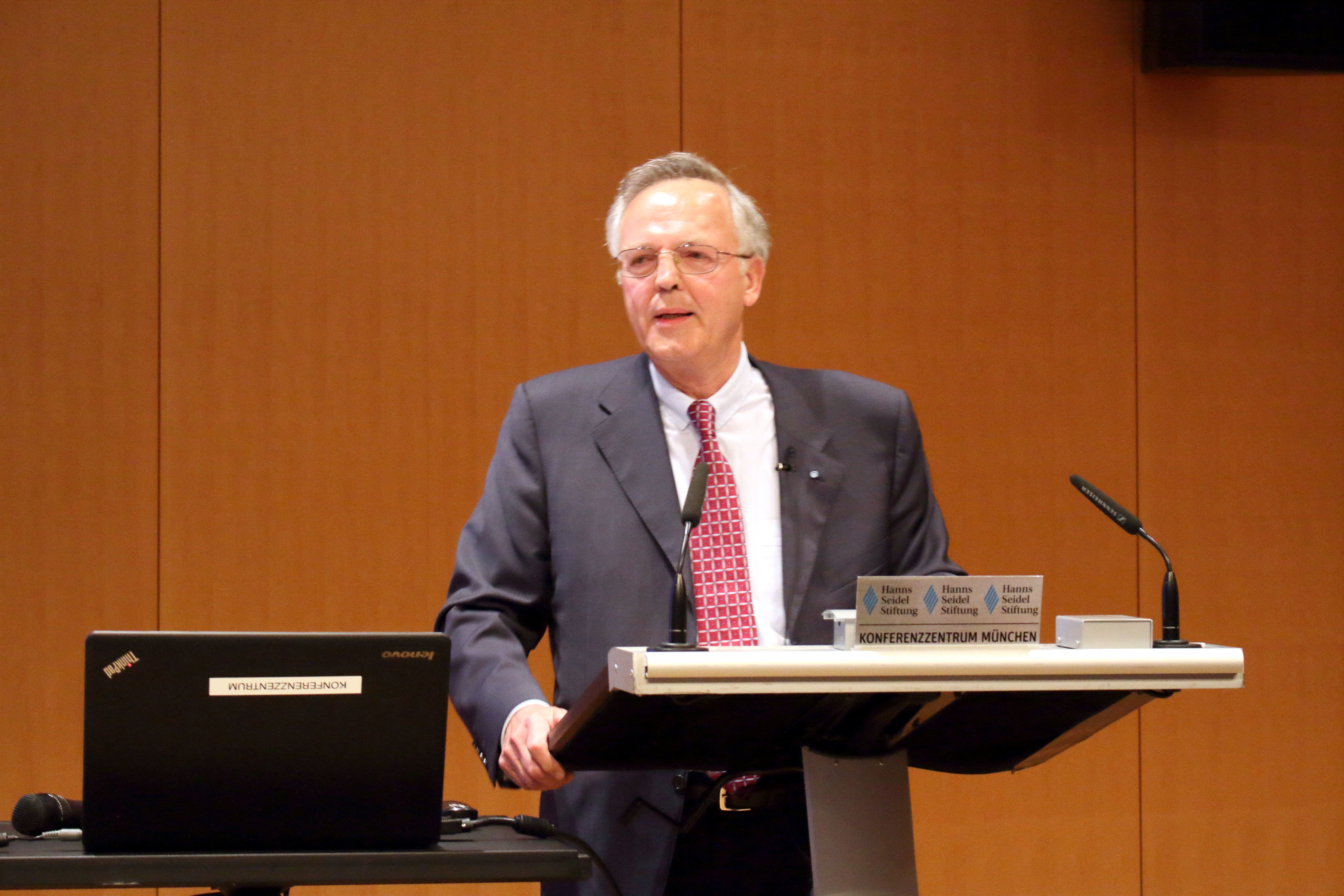 Horst Möller, 2015 in der Hanns-Seidl-Stiftung, München